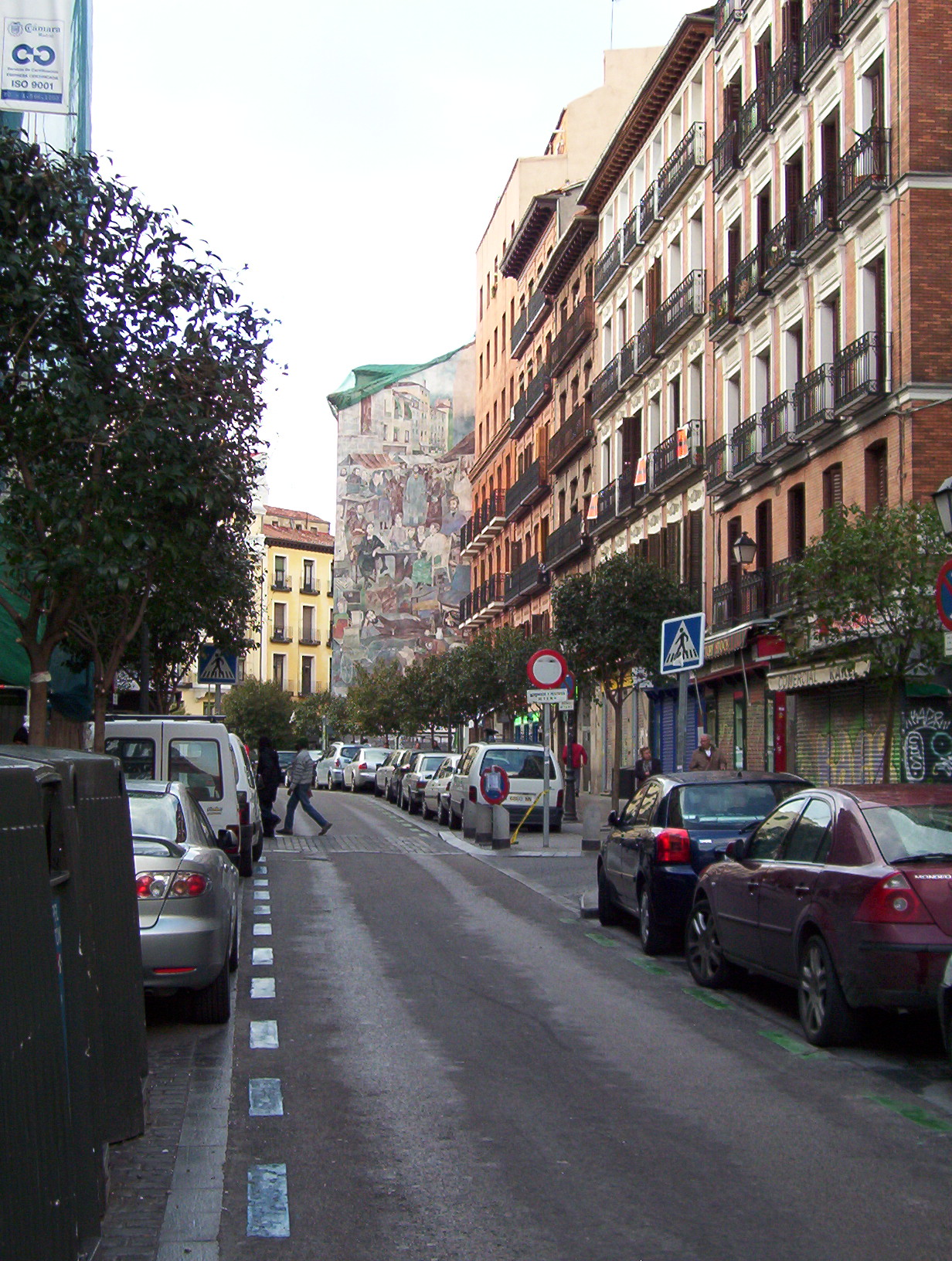 Calle de Embajadores, Mural